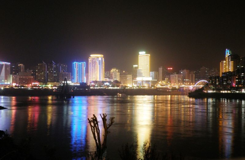 中文（中国大陆）: 南平夜景 2